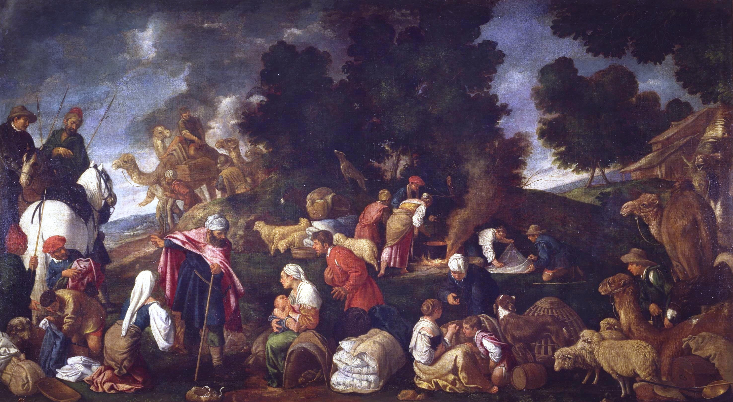 La obra representa a Labán alcanzando a Jacob y a su familia y buscando los ídolos o imagenes que la esposa de Jacob, Raquel, que era su hija, le había robado posiblemente con la intención de que no pudiera adorarlos.